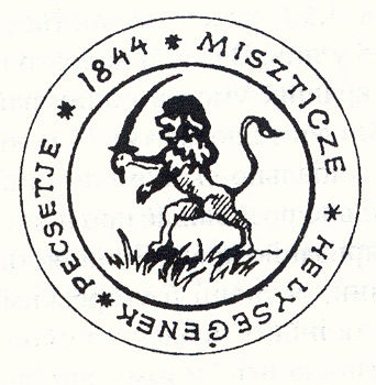 Сільська печатка Імстичева - 1844 рік